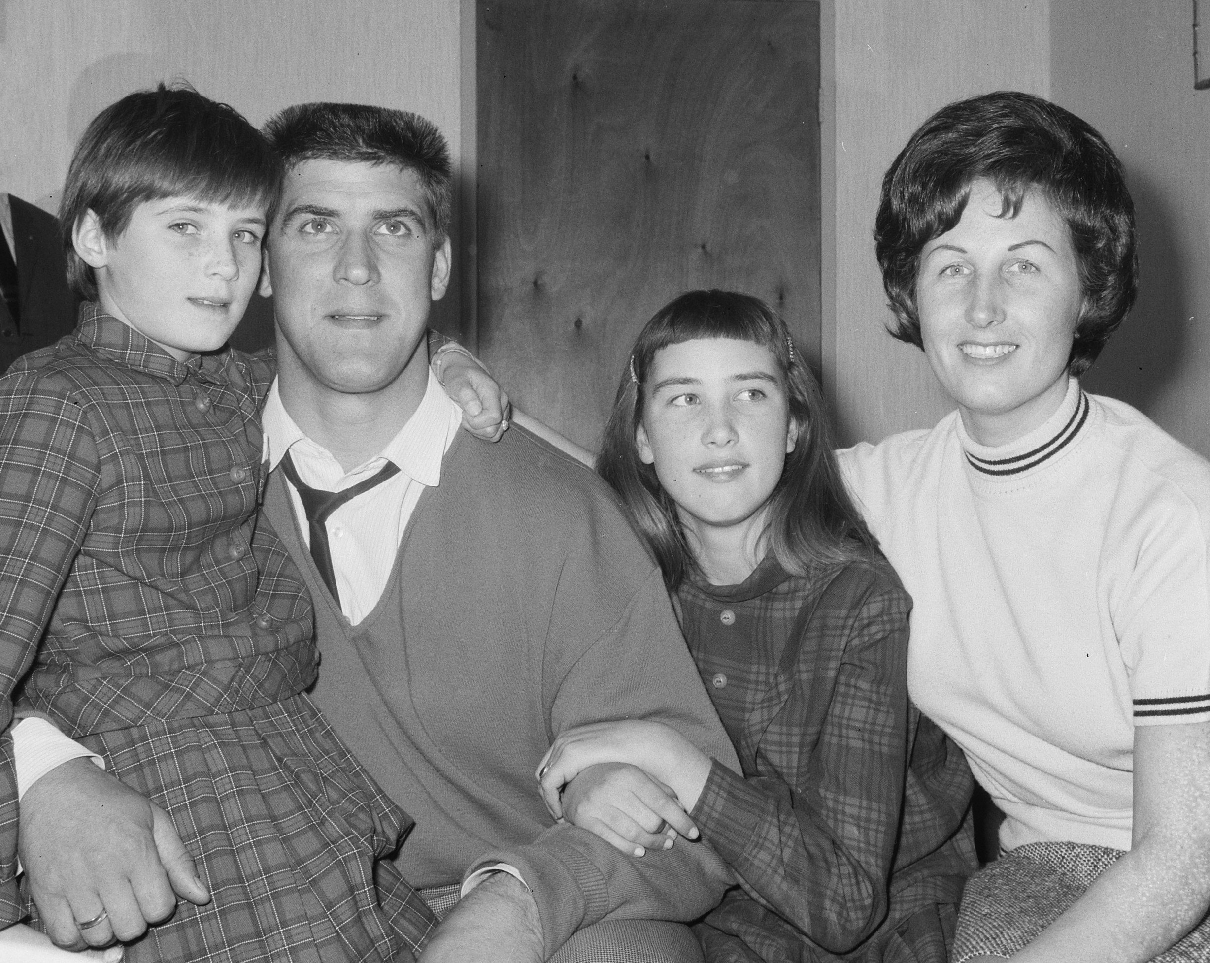 Collectie / Archief : Fotocollectie Anefo Reportage / Serie : [ onbekend ] Beschrijving : Aankomst Anton Geesink te Utrecht, Geesink met vrouw en kinderen Datum : 6 november 1964 Locatie : Utrecht, Utrecht Trefwoorden : kinderen, vrouwen Persoonsnaam : Geesink, Anton Fotograaf : Nijs, Jac. de / Anefo Auteursrechthebbende : Nationaal Archief Materiaalsoort : Negatief (zwart/wit) Nummer archiefinventaris : bekijk toegang 2.24.01.03 Bestanddeelnummer : 917-1062